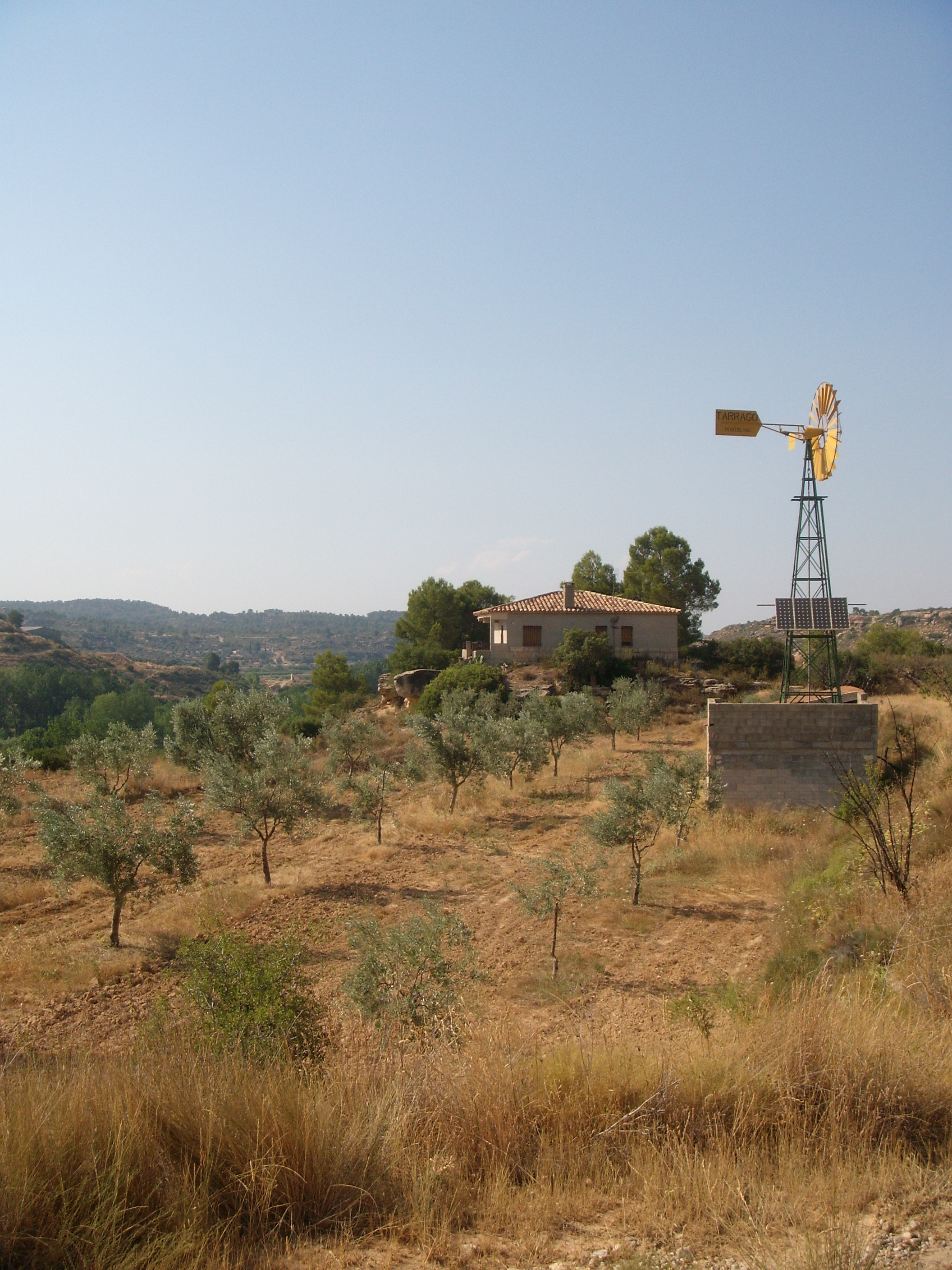 Instalación en una finca de Mazaleón (Teruel) que combina energía eólica y solar